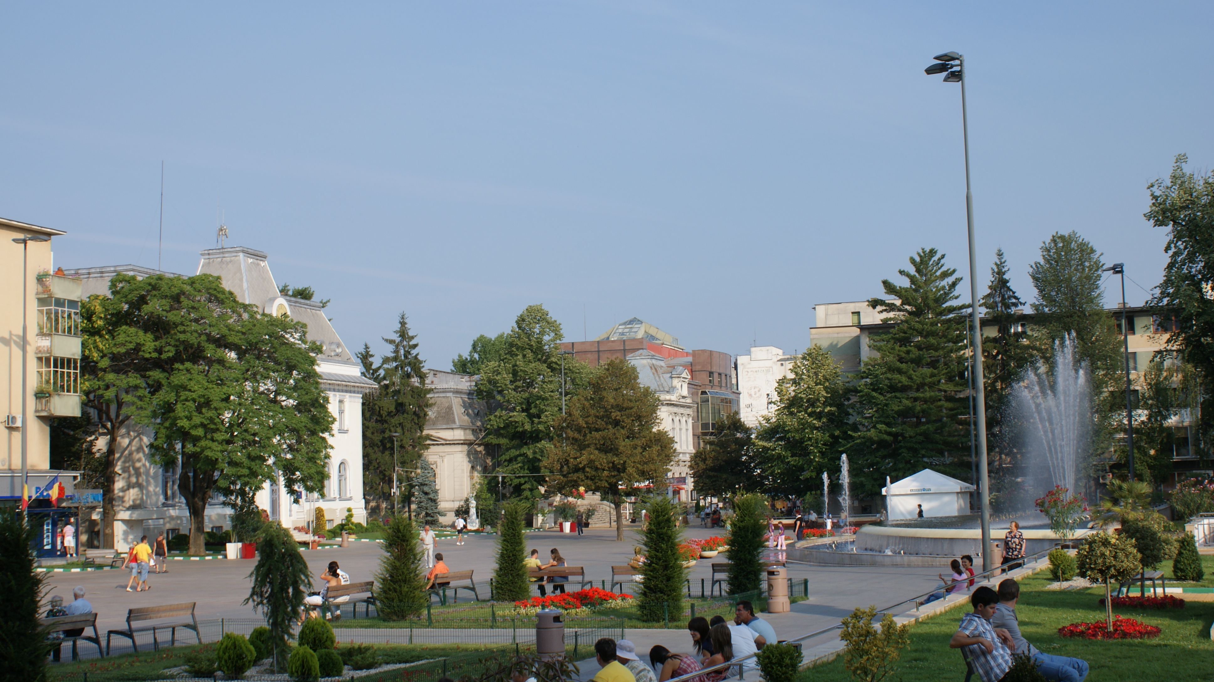 Parc. Piaţa Primăriei 02